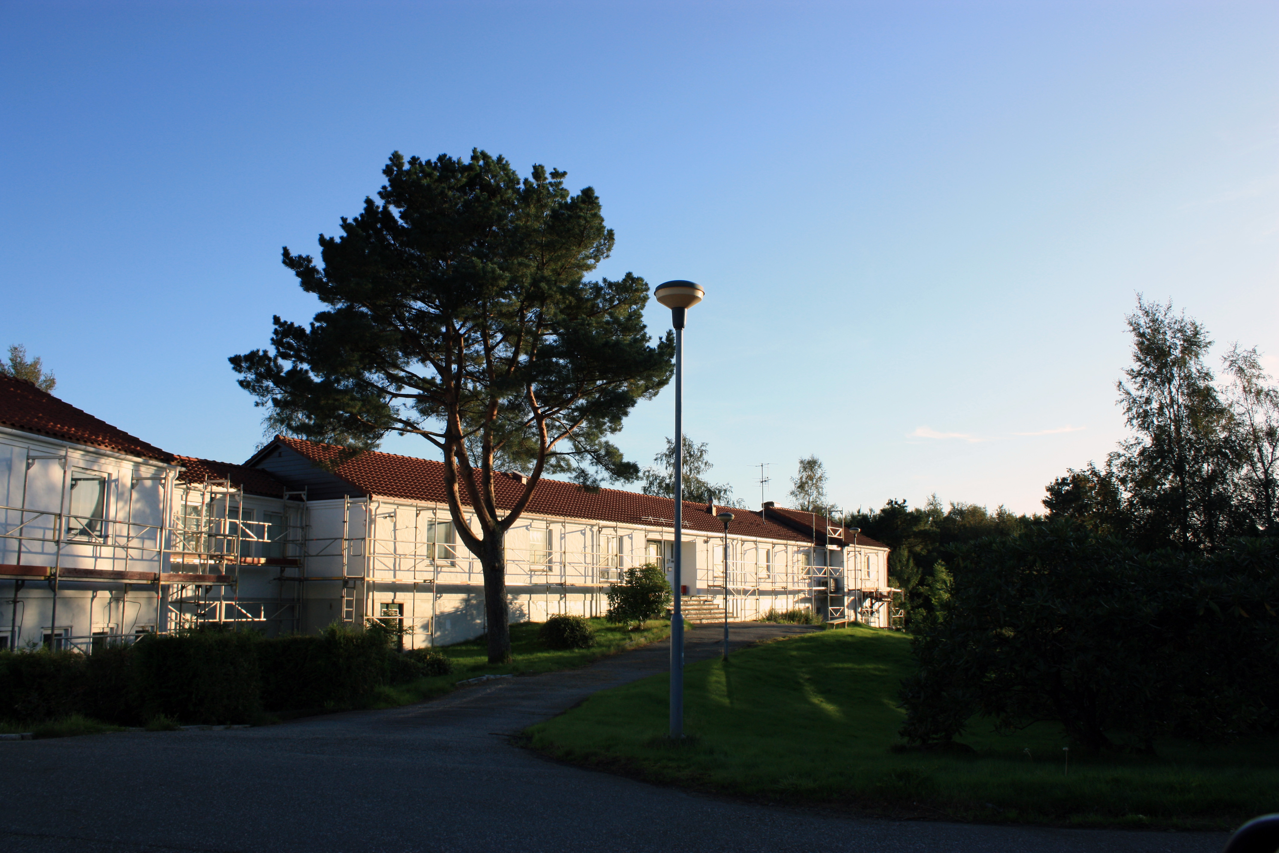 Øvsttunsenteret, Fana, Bergen.